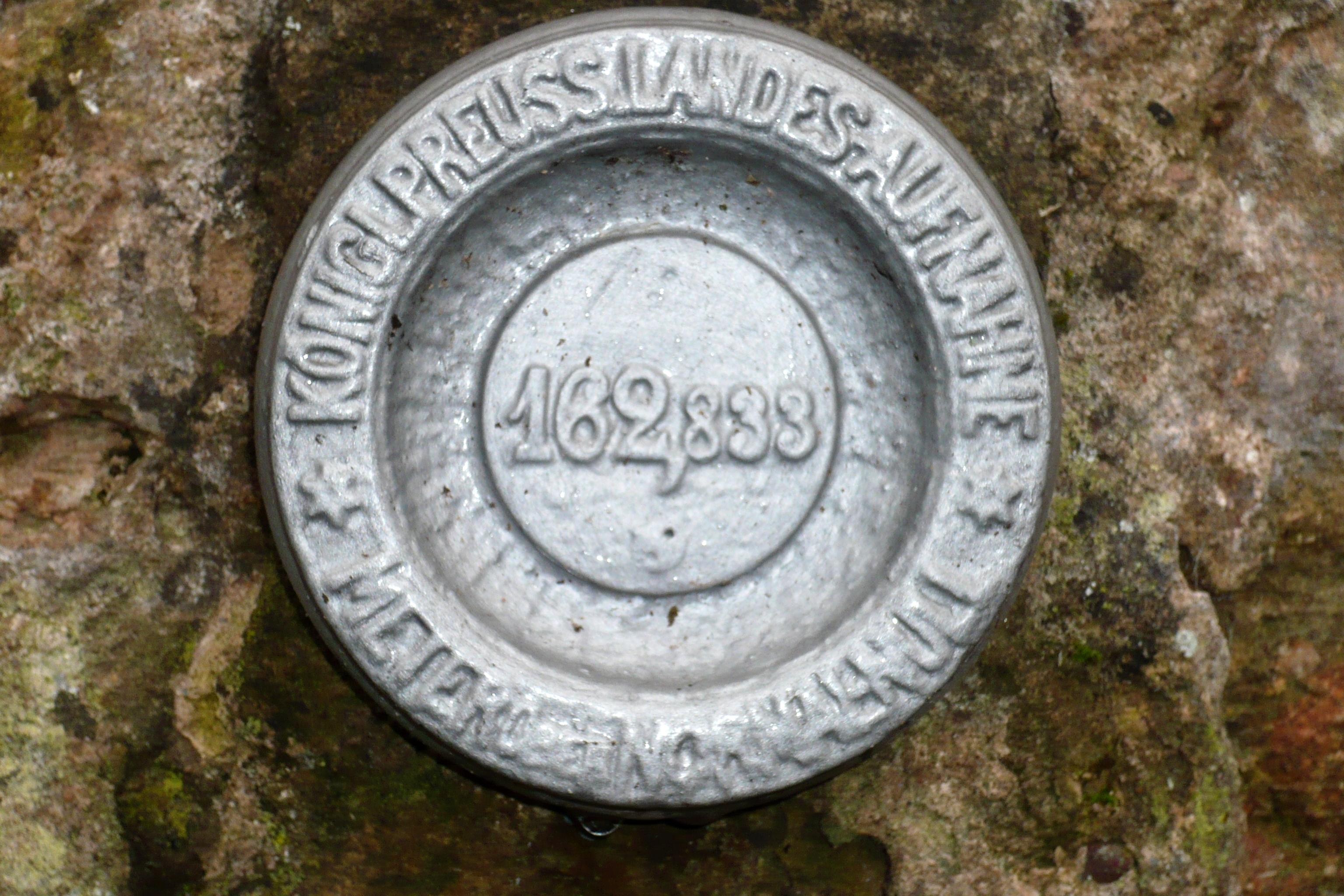 Höhenfestpunkt der Königlich Preußische Landesaufnahme - Ort: Katholische Pfarrkirche "St. Laurentius" in Saarburg - Aufschrift: "Koenigl Preuss Landes-Aufnhame 162,833 Meter über Normal Null"